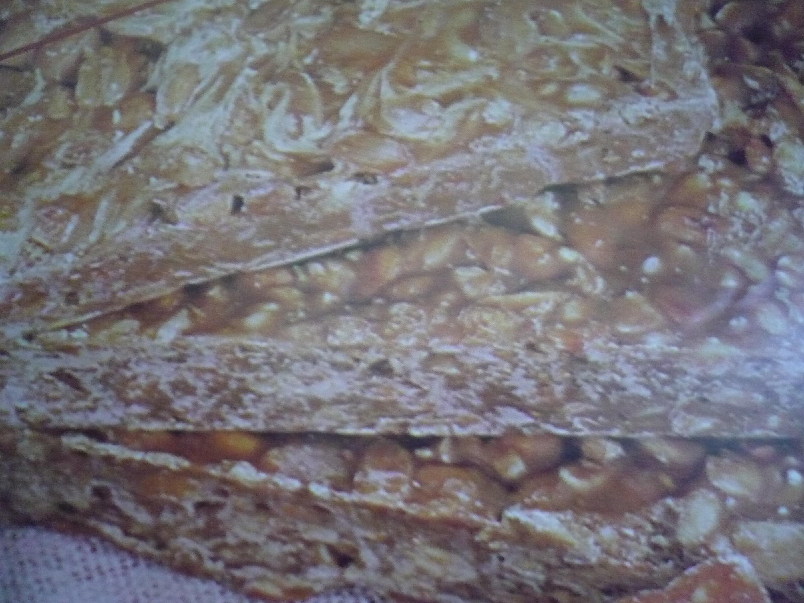 Ka'i Ladrillo. Avañe'ẽ: Ka'i Ladrillo.